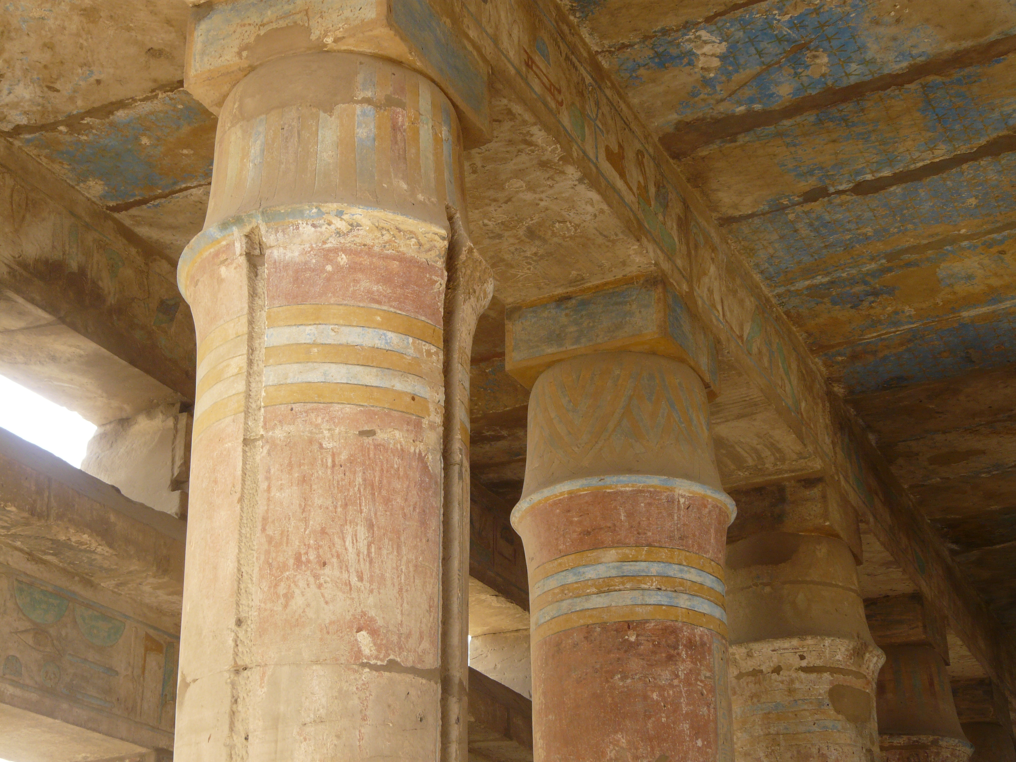 Karnak - Salle des fêtes de Thoutmosis III - Détails de colonne